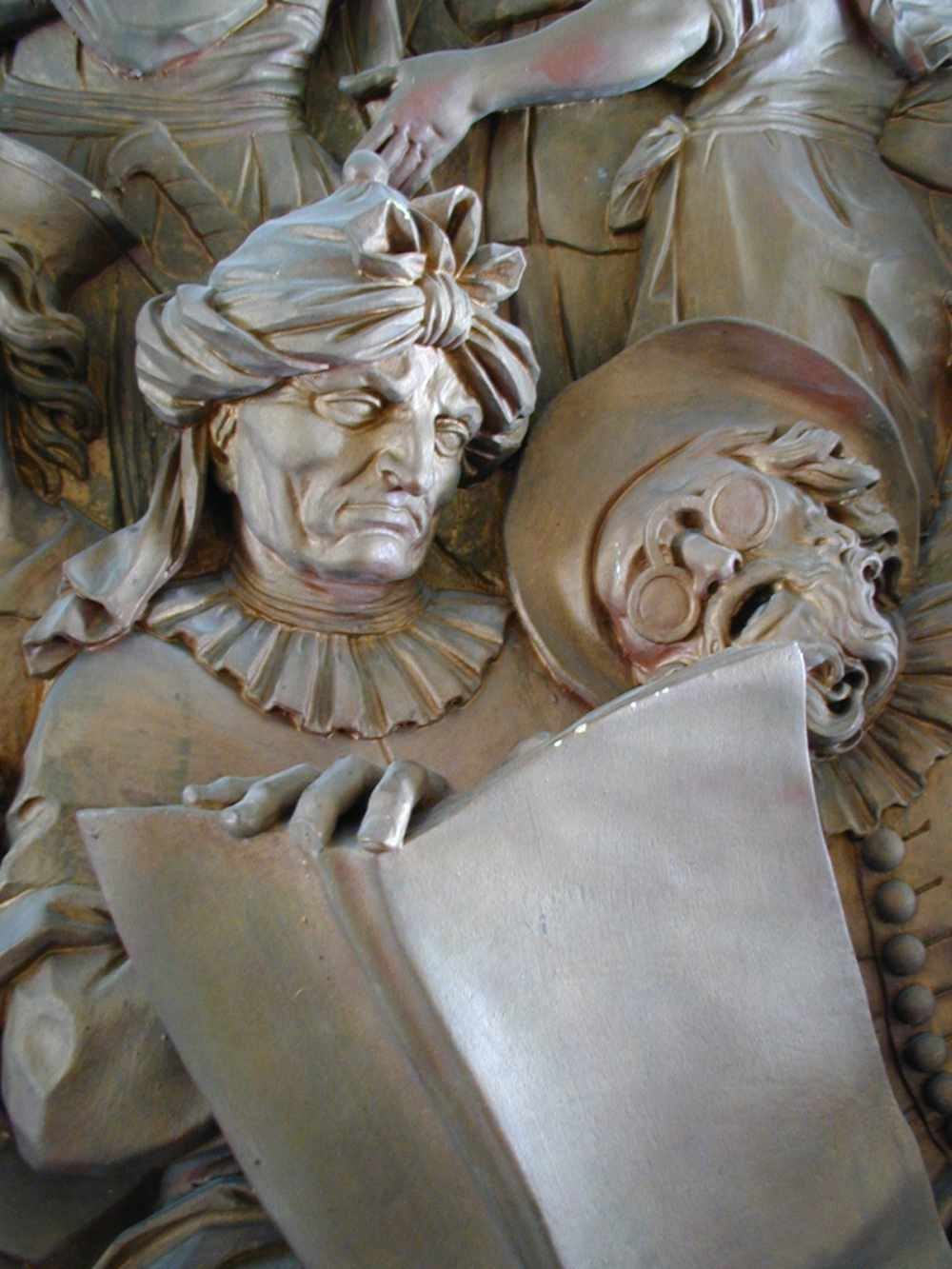 Josef Stammel, Relief "Jesus im Tempel" - Ausschnitt